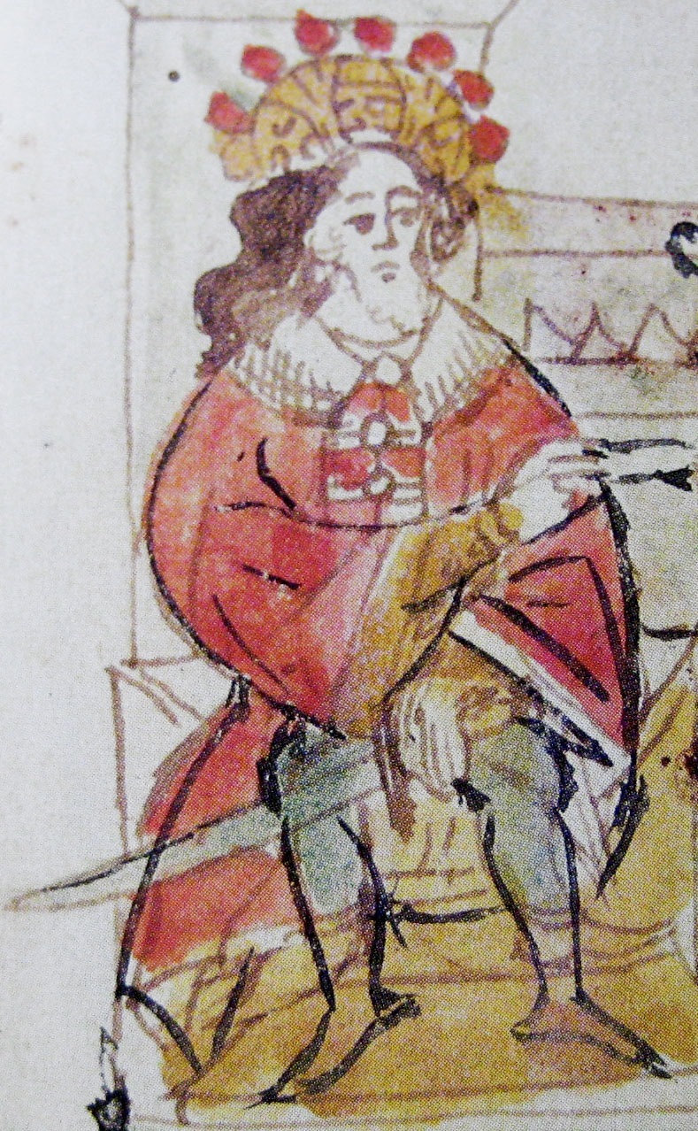 Беларуская (тарашкевіца): Усяслаў Полацкі (Чарадзей) зь мініятуры Радзівілаўскага летапісу